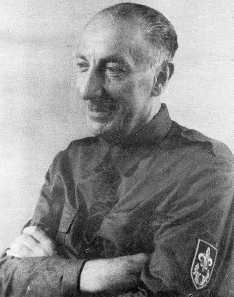 Oleksandr Tysovskyj